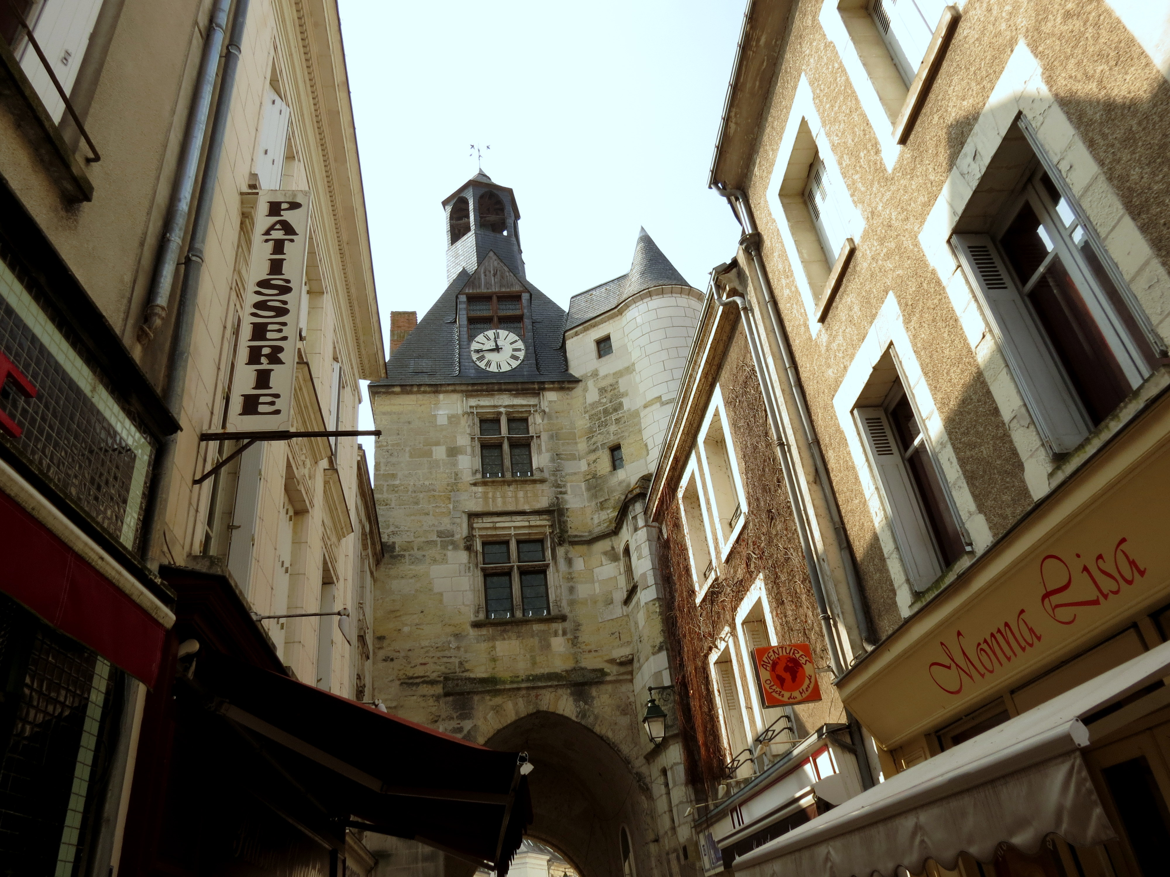 Les châteaux de la Loire.